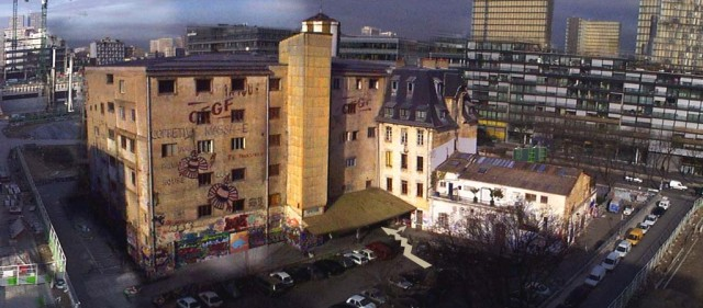 Paris (France) : Vue générale des Frigos et de la façade par F. Schnepp.